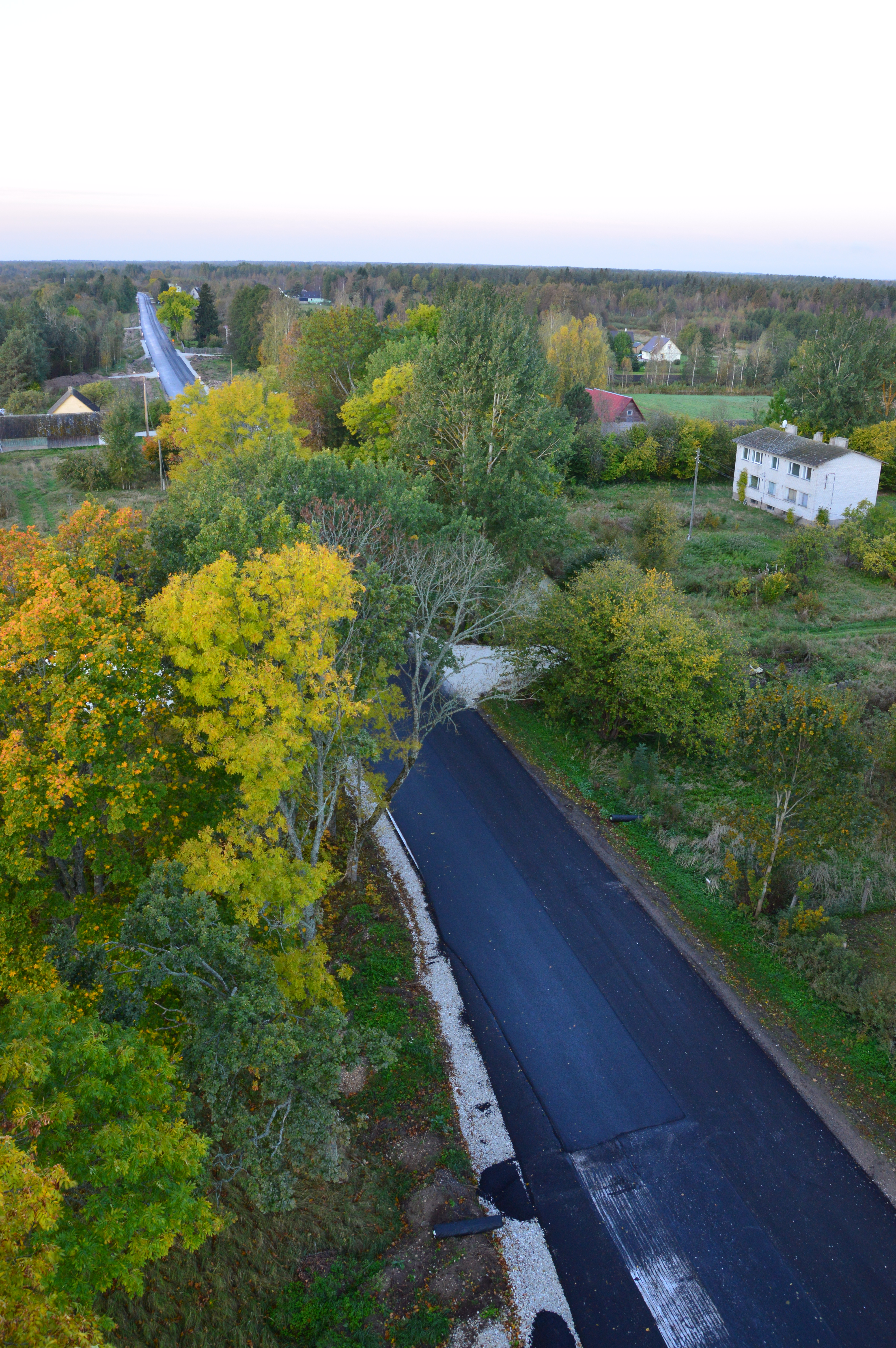 Jõhvi–Tartu–Valga põhimaantee Ninasi külas vaatega edelasse (Kalmaküla poole). Tee on saanud värskelt uue katte.